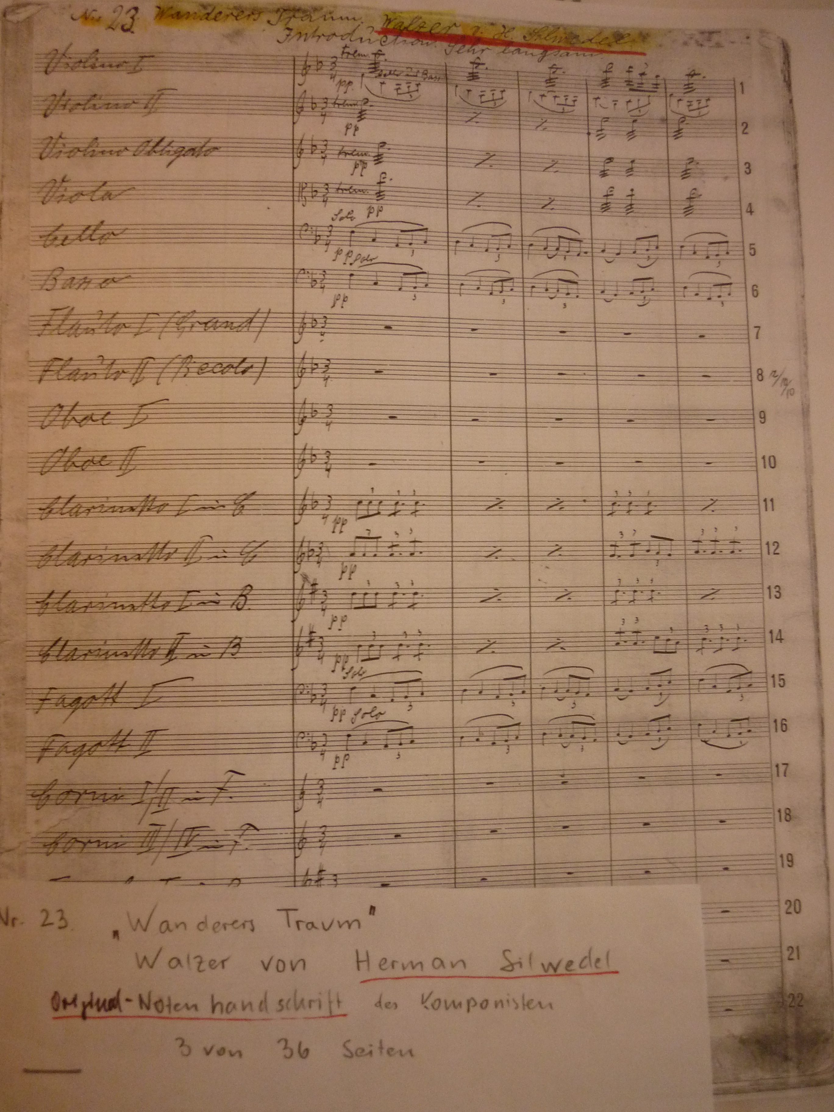 Silwedel Wanderers Traum Noten von Hermann Silwedel